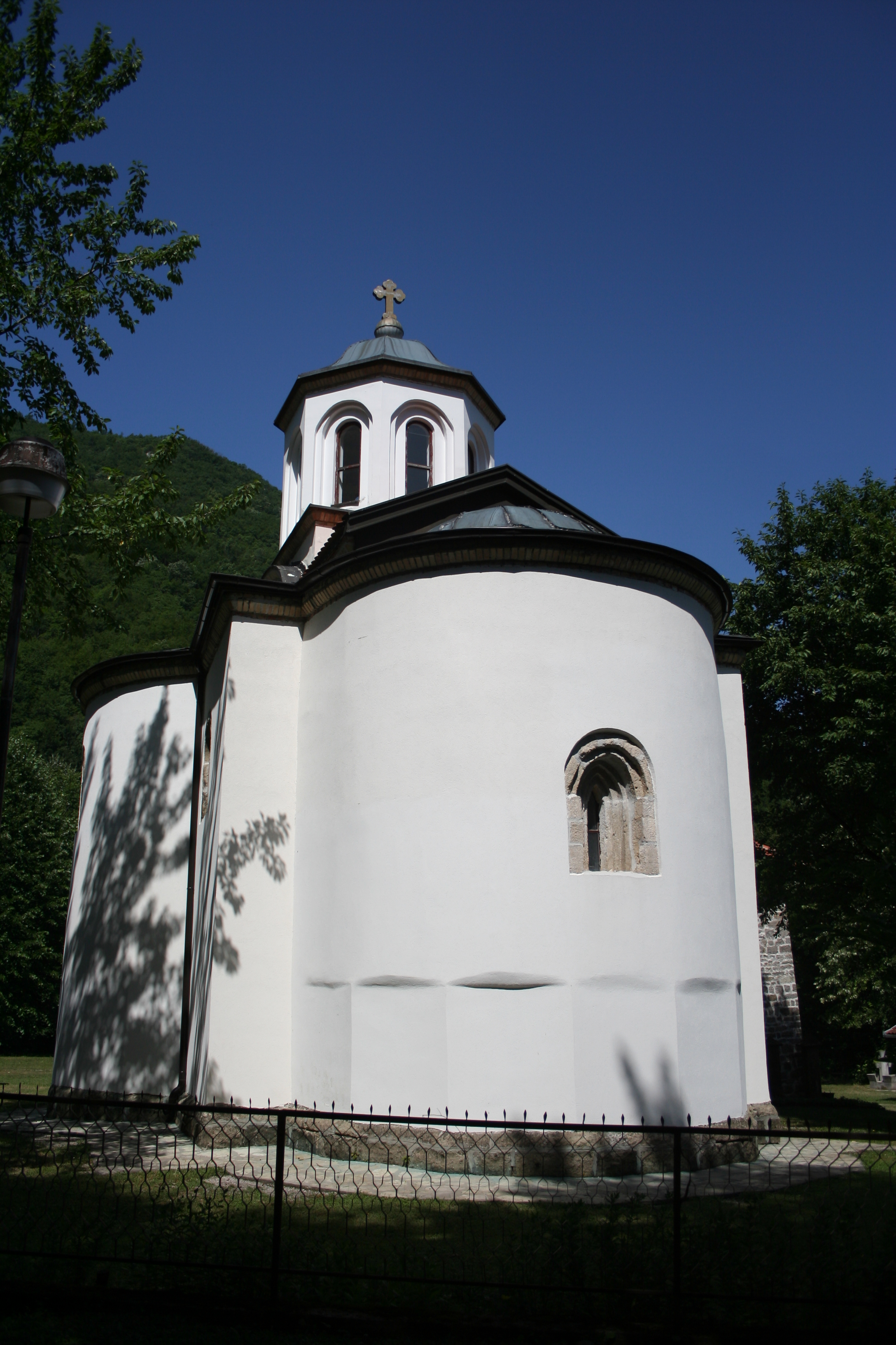 Crkva Svetog proroka Ilije, selo Ba